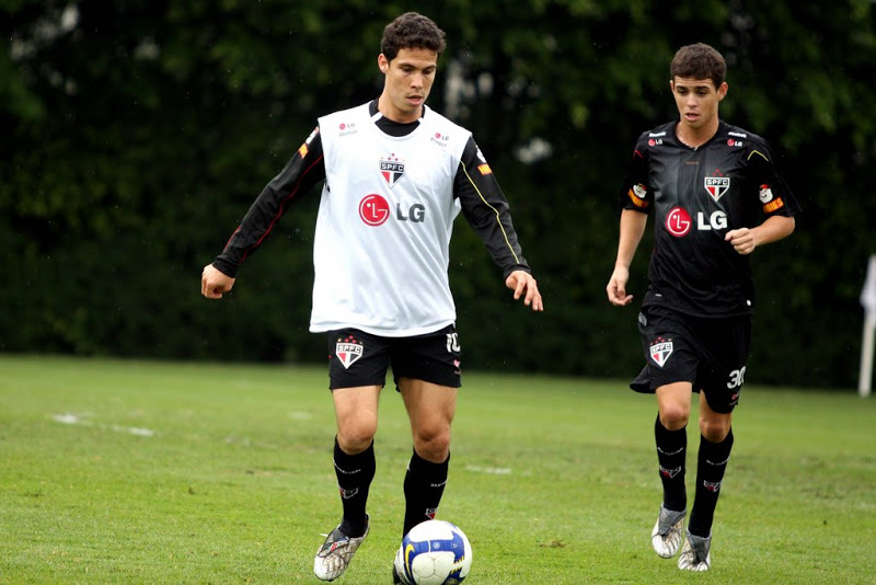 treino são paulo 22-09. na foto e/d hernanes e oscar. hernanes treinou com bola e pode voltar no domingo contra o corinthians.